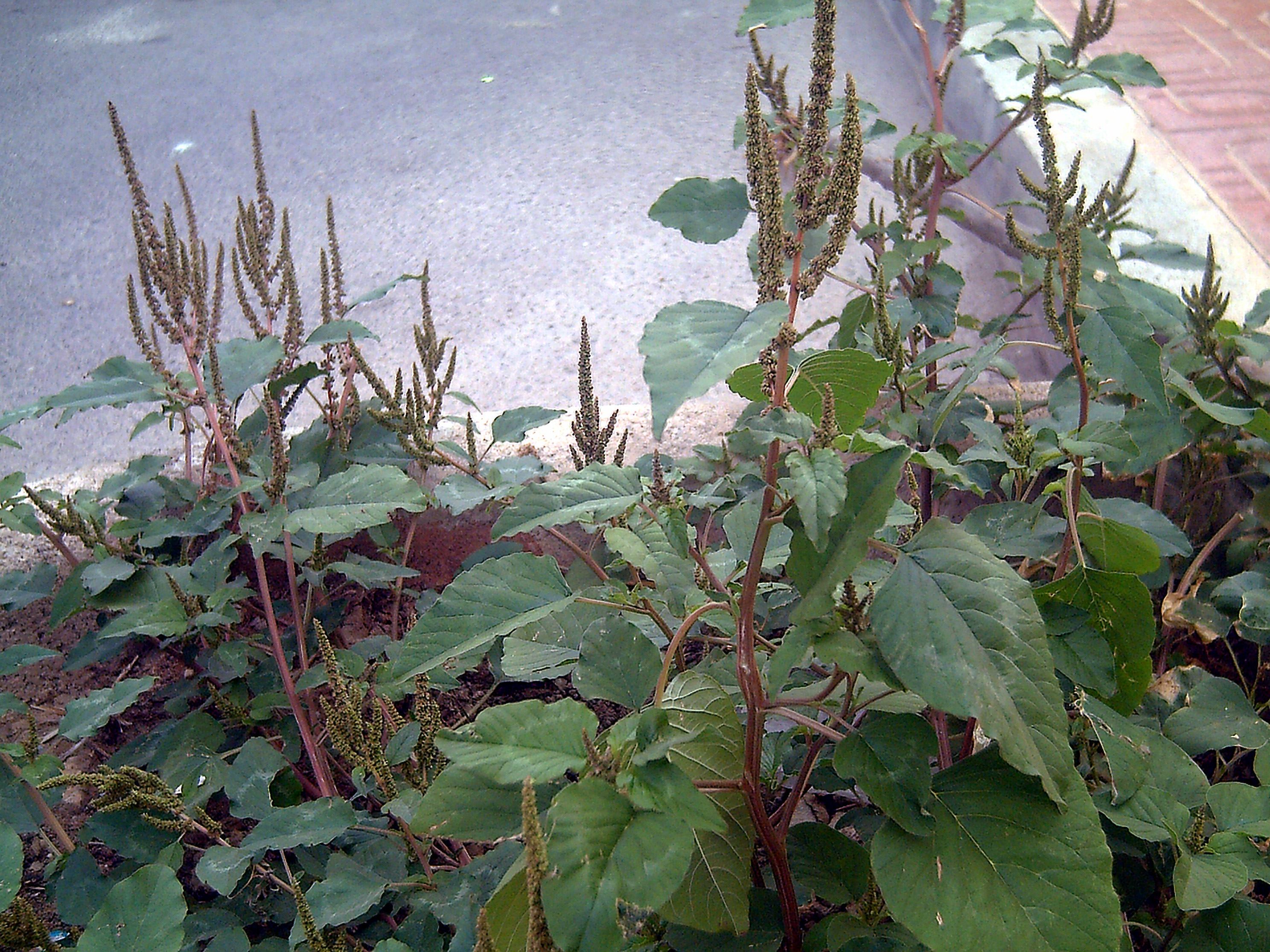 Amaranthus viridis plant, Torrelamata street, Torrevieja, Alicante, Spain